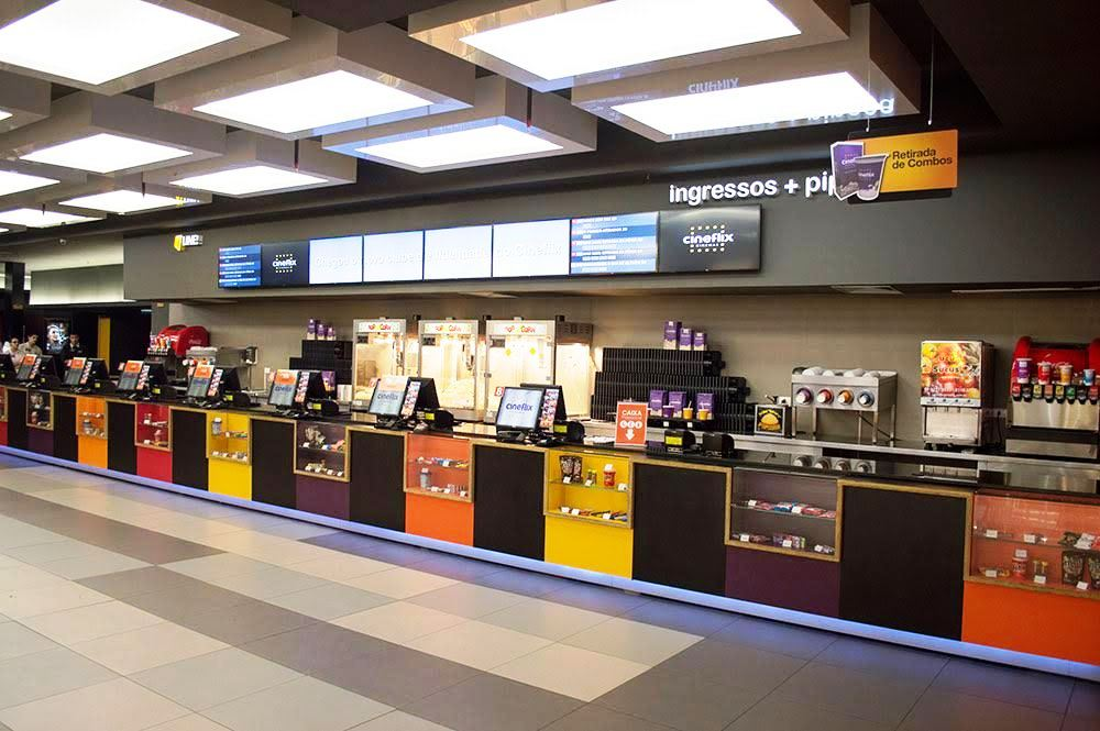 Bilheteria do Cineflix Shopping Pelotas, de Pelotas, RS